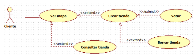 La imagen describe los distintos casos de uso de la aplicación Chinator.